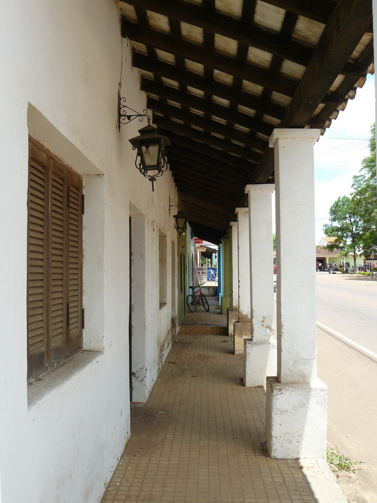 Fotos de los refugios y reservas de Itaipu, tomadas en los años 2007 y 2008 por mí